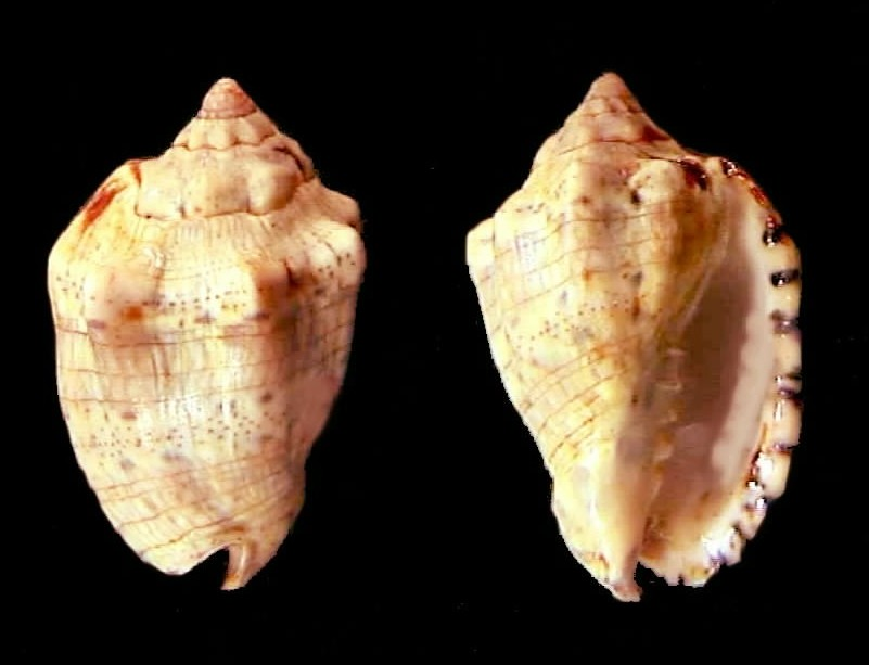 Foto de Voluta musica (Gastropoda: Neogastropoda: Volutidae)